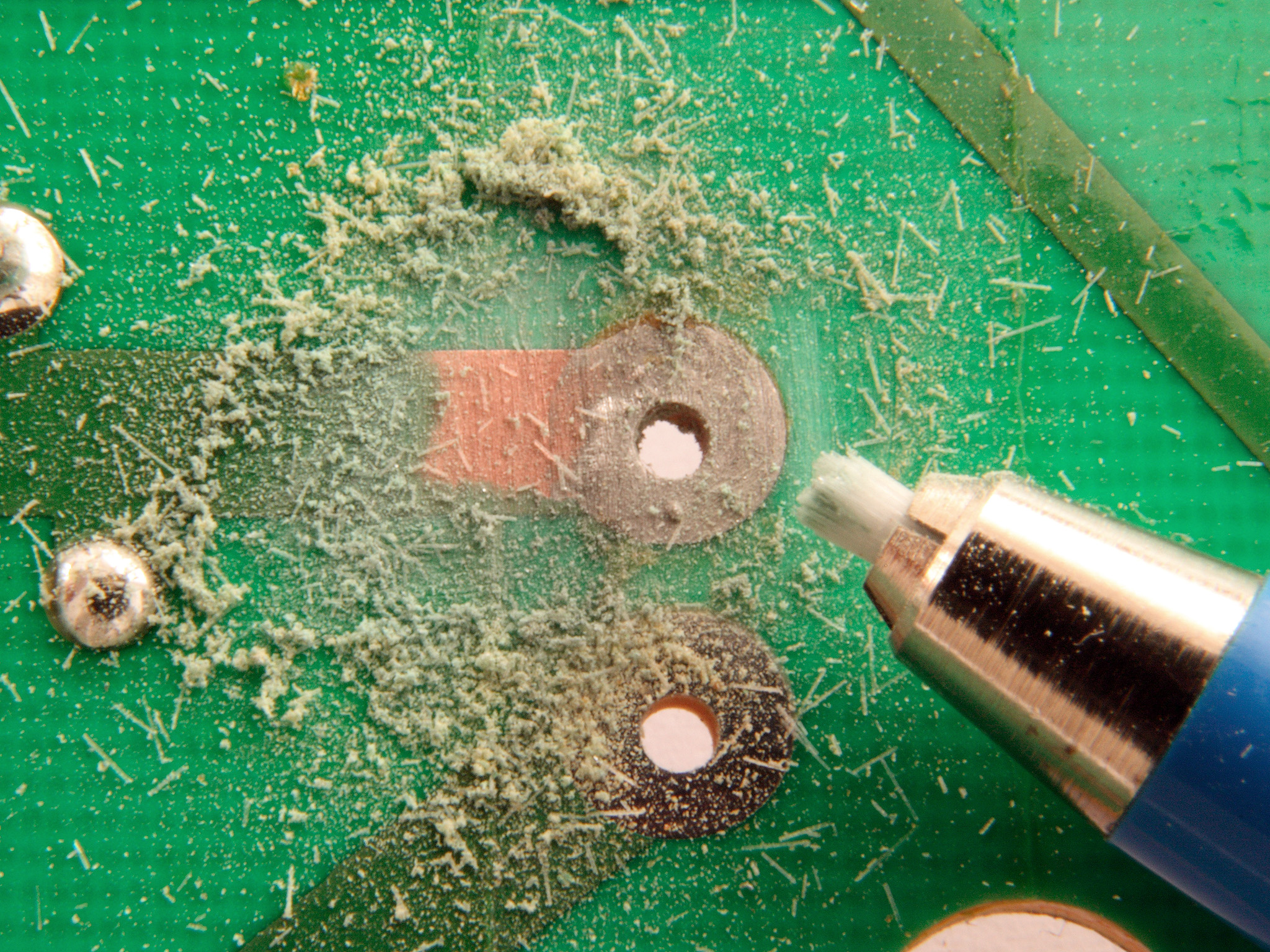 Anwendungsbeispiel Glasfaserradierer: Säubern einer Lötstelle und Entfernen des Schutzlacks auf einer Platine. Gut zu erkennen sind die abgebrochenen Glasfaserpartikel.